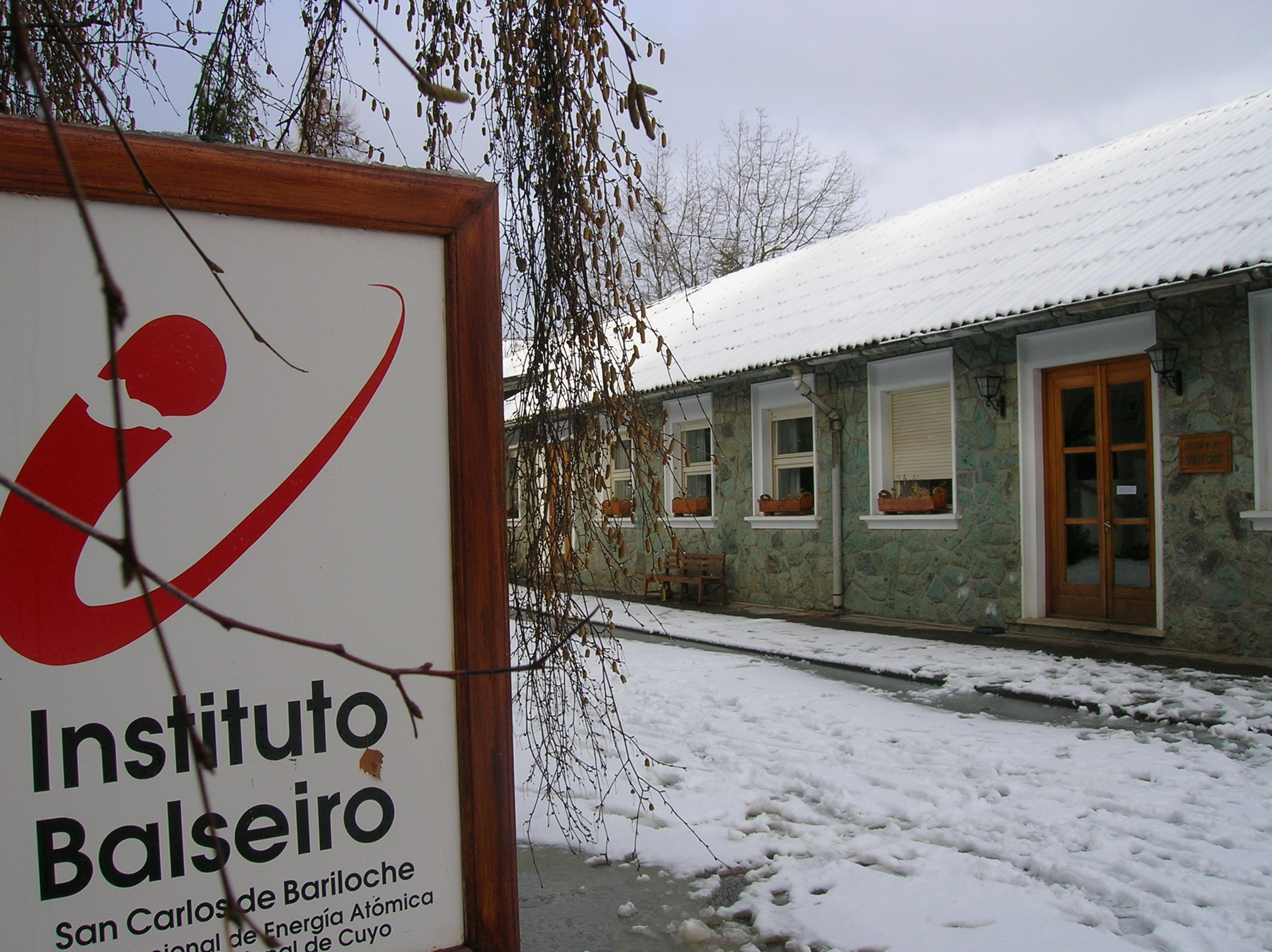 Instituto Balseiro, invierno 2007